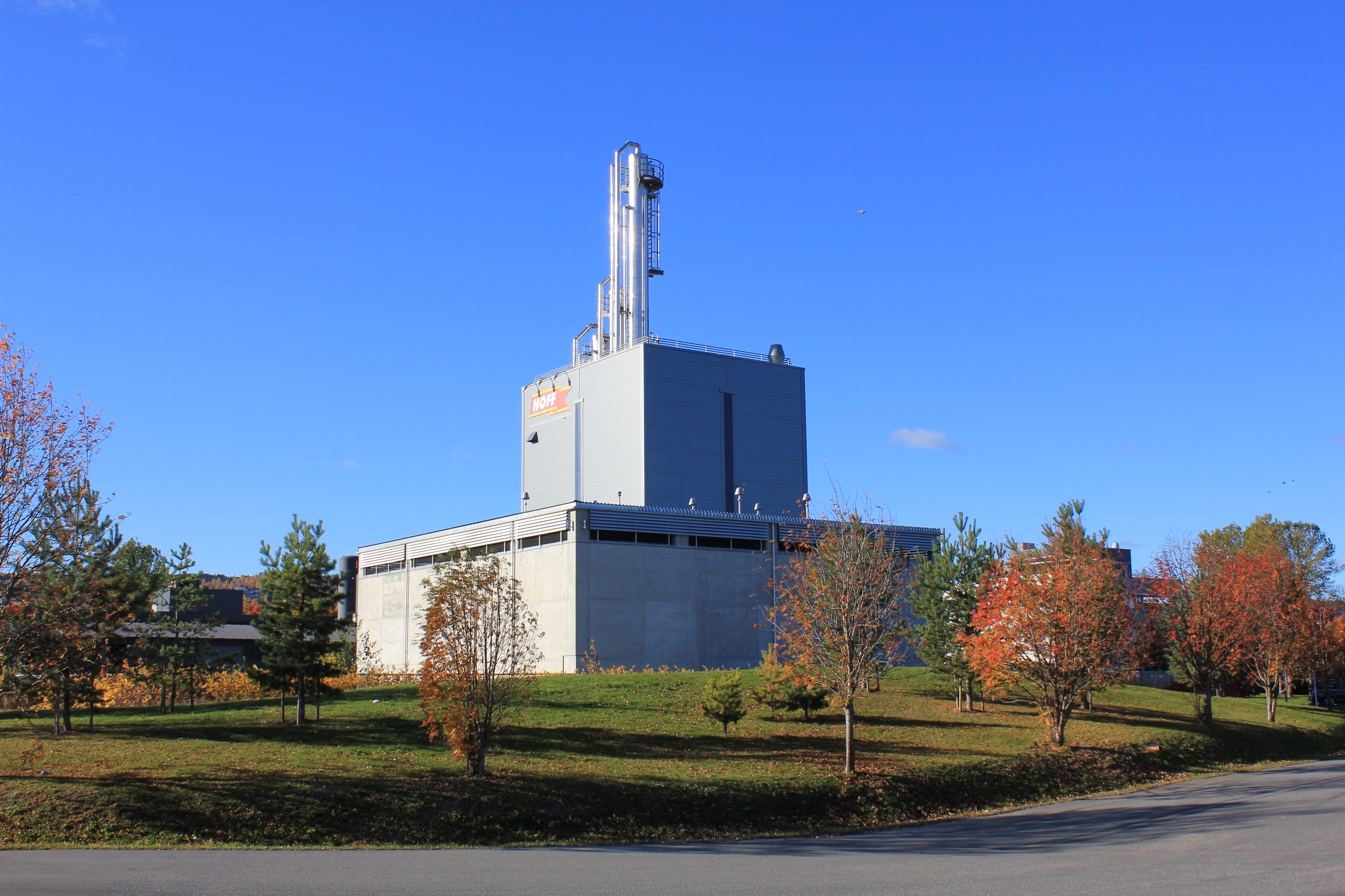 Ved HOFF SA ved båthavna finner man det nye anlegget for produksjon av rektifisert (renset) sprit fra poteteter, all råsprit til norsk akevittproduksjon framstilles her. 500 liter 96 prosent sprit kommer ut hver time, produksjonen går døgnet rundt. Anlegget er innkapslet i tykke betongvegger for å tåle en evt. eksplosjon. Grunnet eksplosjonsfaren er prosessen helautomatisert, ingen personer har lov til å oppholde seg inne i anlegget under drift.